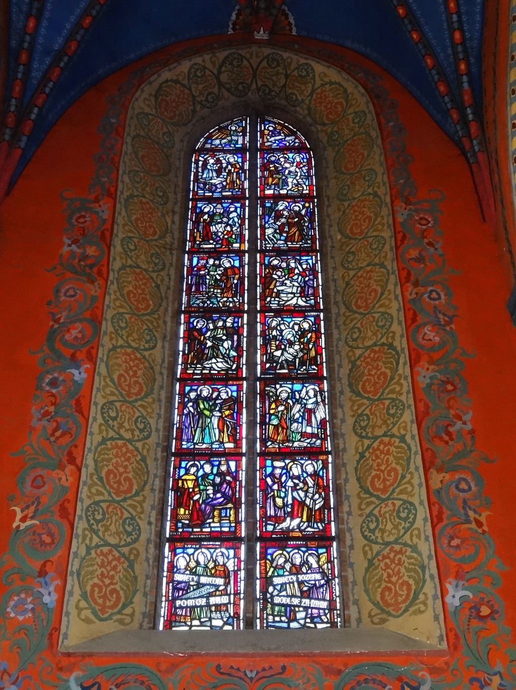 Katedra w Bydgoszczy. Witraż w ścianie zachodniej wykonany przez art. malarza Henryka Nostitz-Jackowskiego z Poznania (1923-24), po zniszczeniach wojennych uzupełniony i zakonserwowany przez art. mal. witrażystę Edwarda Kwiatkowskiego z Torunia (1949-54).